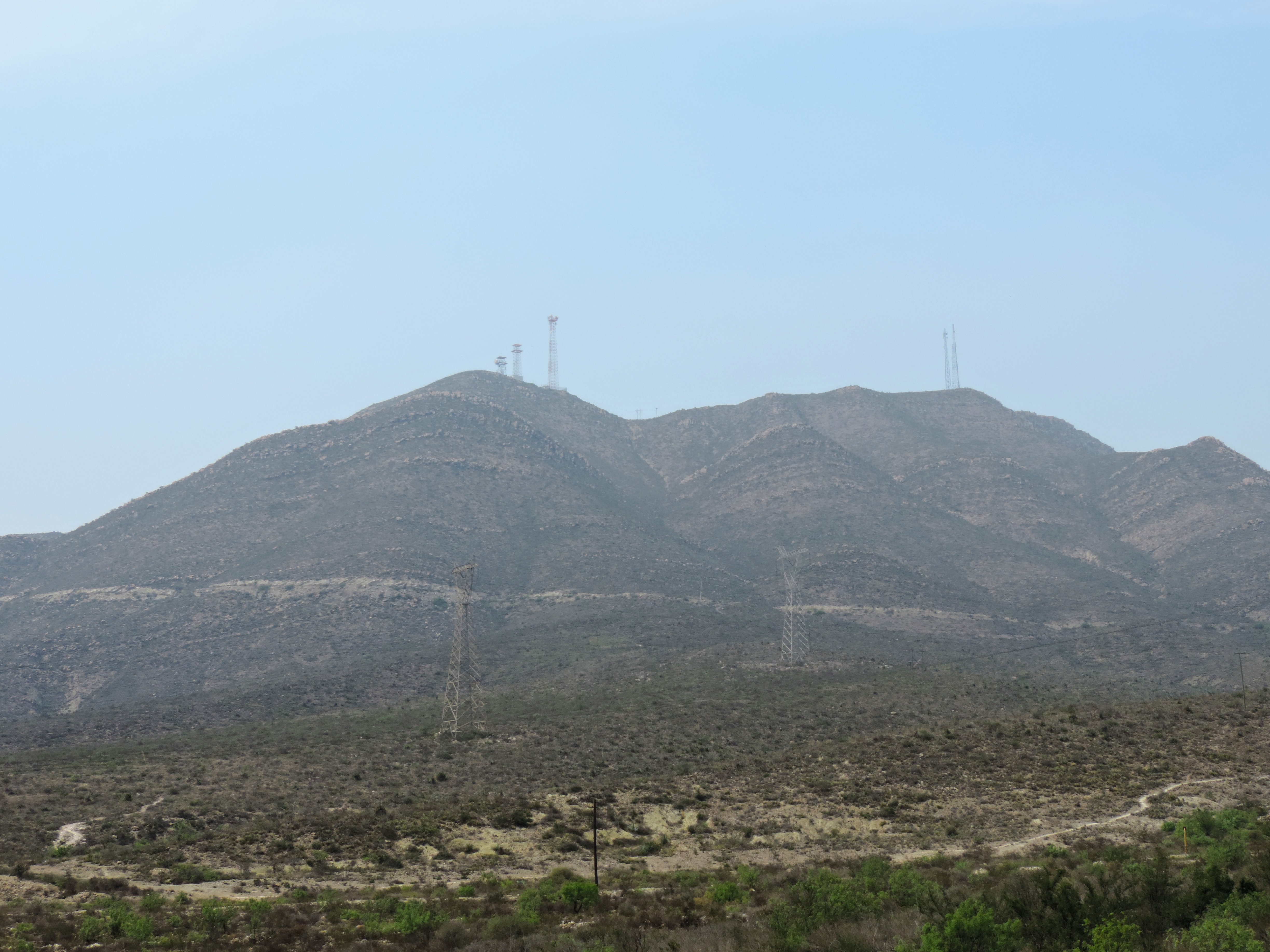 Sierra Corral de los Bandidos desde el sur